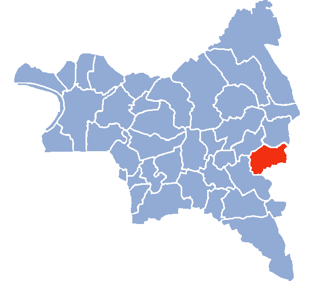 Auteur Hervé SUAUDEAU Licensing Catégorie:Cartes de Seine-saint-Denis Category:Montfermeil